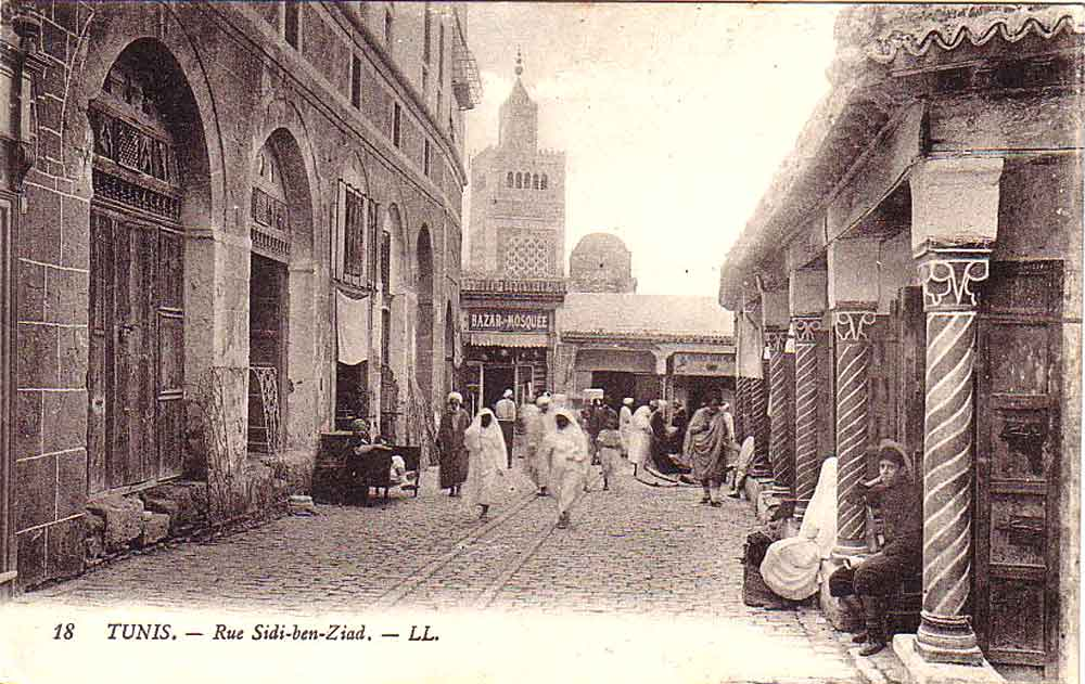 Le nouveau minaret de la Zitouna vu de la rue Sidi Ben Ziad Collection particulière Bertrand Bouret